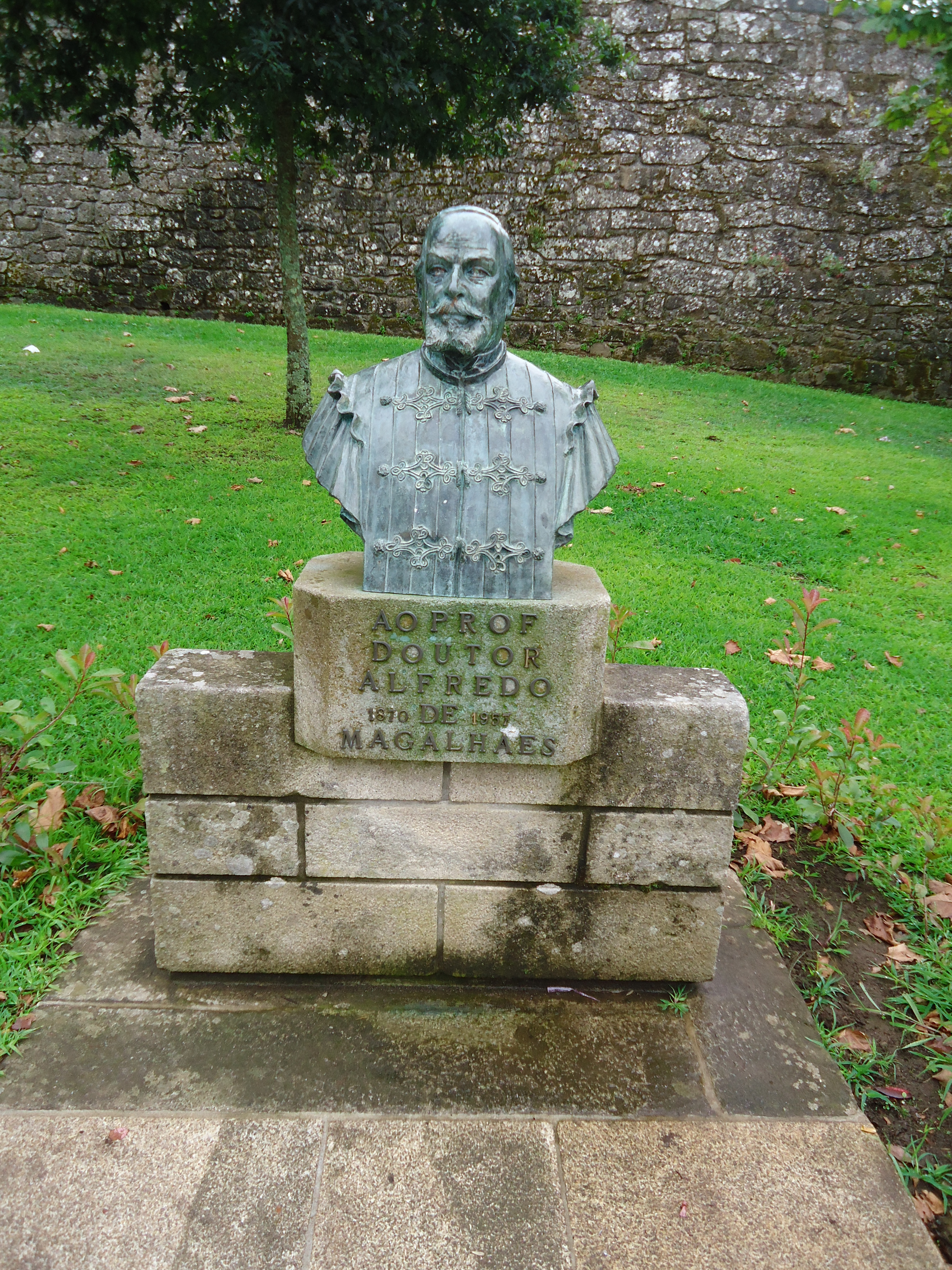 Praça-forte de Valença, Portugal: busto de Alfredo de Magalhães, em bronze, no Recinto da Coroada.